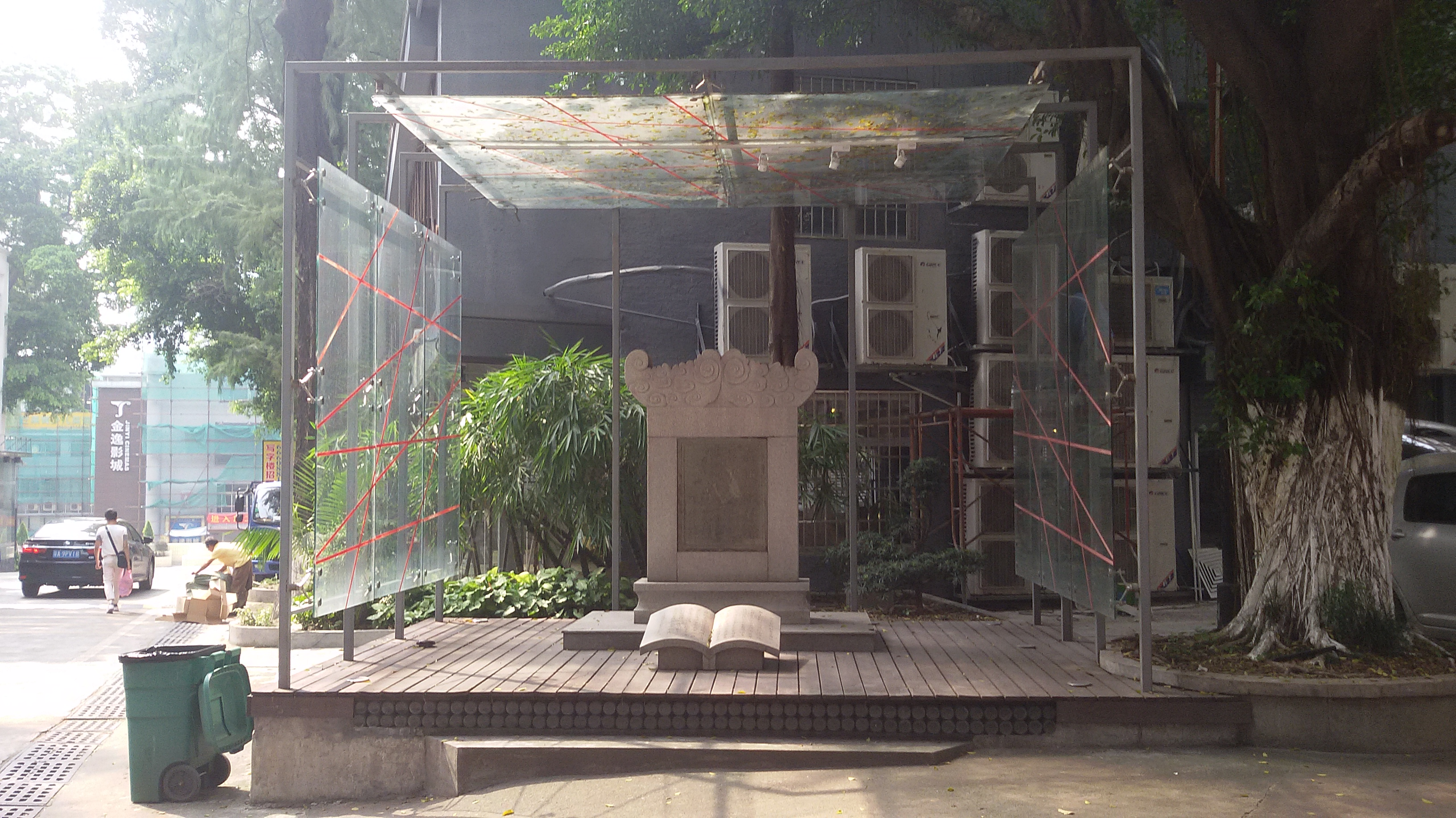 粵語: 廣東飲料廠舊址嘅奠基紀念碑